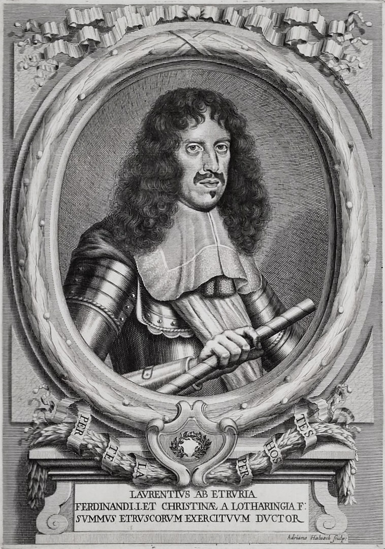 Lorenzo_di_ferdinando_de'_medici